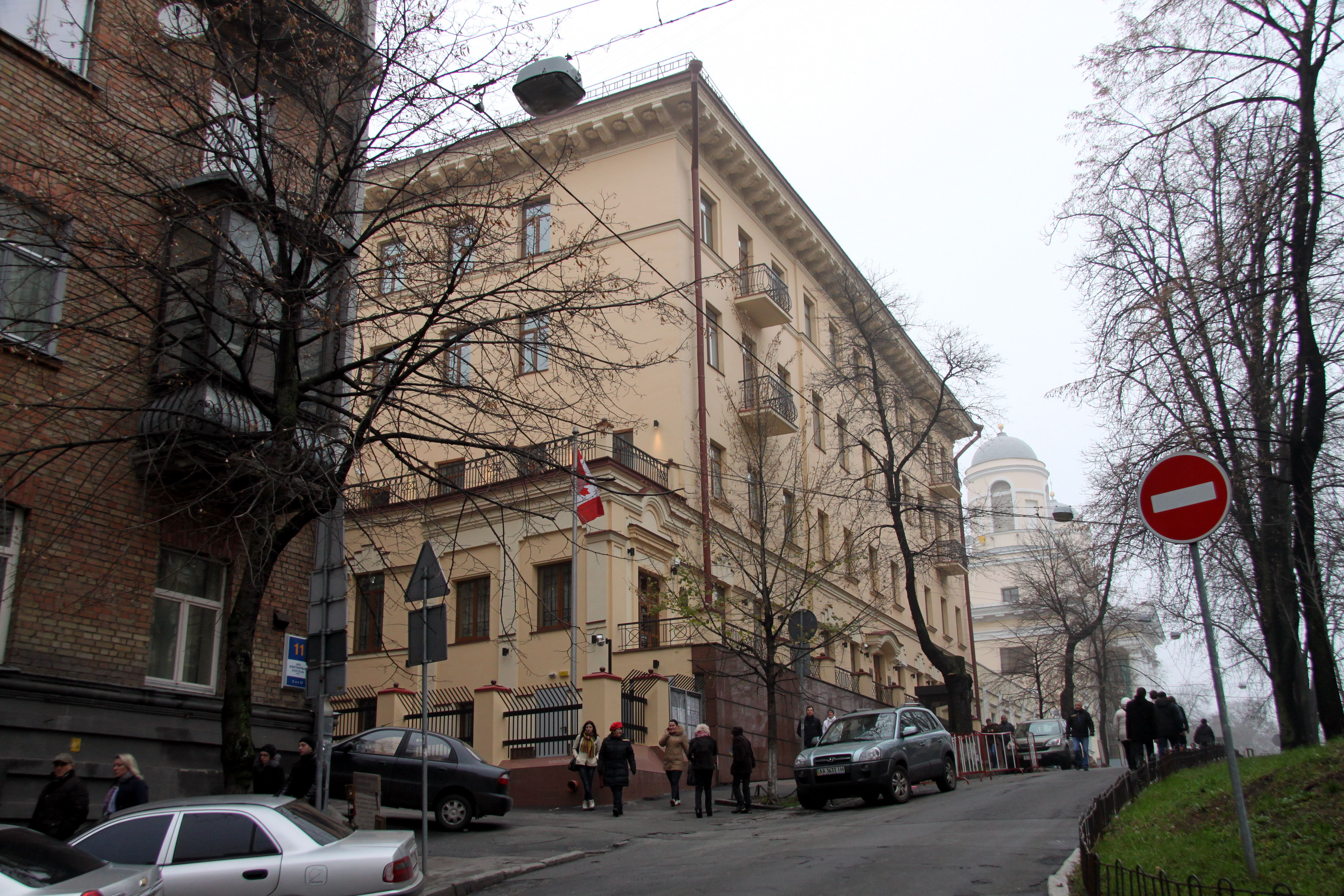 Будинок причту (плебанії) в якому проживав Андрей Шептицький, І. О. Світличний, Костьольна вул., 13, Київ. Наразі будівлю займають посольства Канади та Австралії в Україні.